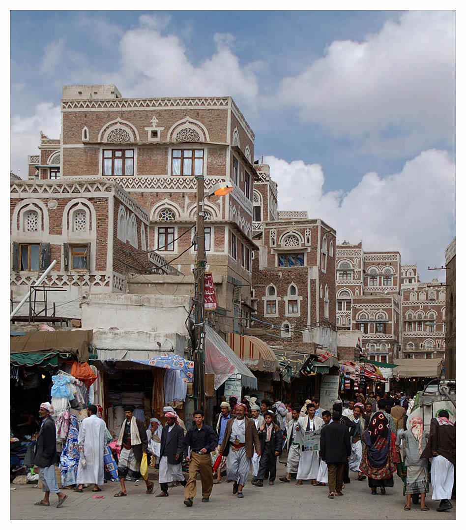 Inmitten des jemenitischen Hochlandes auf 2200 m Höhe , schmiegt sich die Stadt in die Senke, die im Osten vom Jabal Nuqum, im Westen vom mehr als 3000 Metern hohen Jabal Ayban begrenzt wird. Sanaa ist eine bezaubernde Stadt zwischen orientalischem Märchen und dem 21. Jahrhundert. Arabische Städte habe eine Gemeinsamkeit: Die Menschen leben in drangvoller Enge, die für einige Besucher aus Europa häufig als sehr anstrengend empfunden wird. Doch die Enge hat ihren Grund. Umgeben von der feindlichen Wüste, siedeln sich die Menschen seit jeher dort an, wo Wasser am nächsten und leichtesten verfügbar ist. Inzwischen wurden in Sanaa zahlreiche neue Wasserquellen erschlossen.